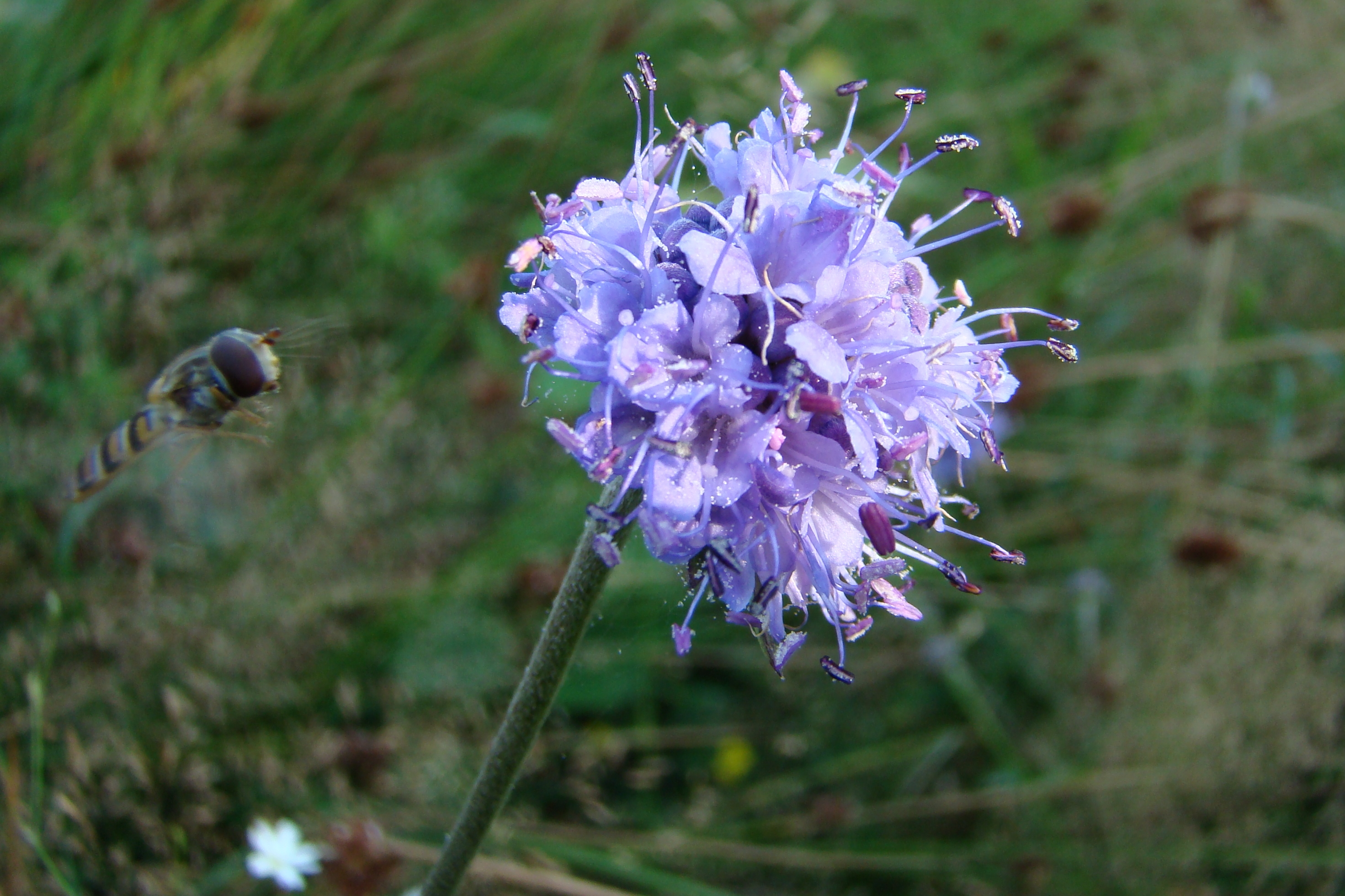 Gemeiner Teufelsabbiss (Succisa pratensis)